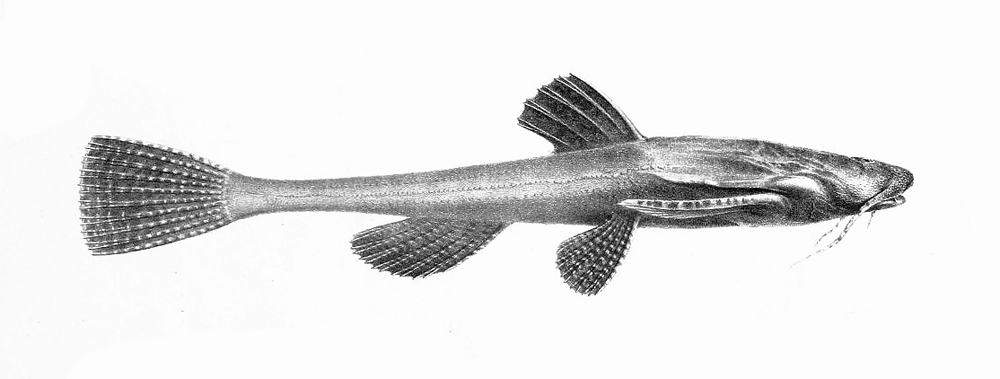 Bunocephalus coracoideus